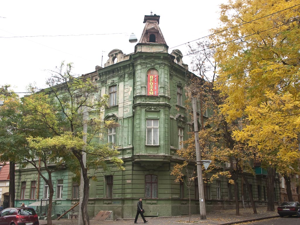 Украина (Україна): обл.Одесская (обл.Одеська): Одесса (Одеса): р-н Приморский: ул.Княжеская (вул.Князівська),19: доходный дом, арх. А.Е.Шейнс, 1895г.; 13:13 05.11.2008